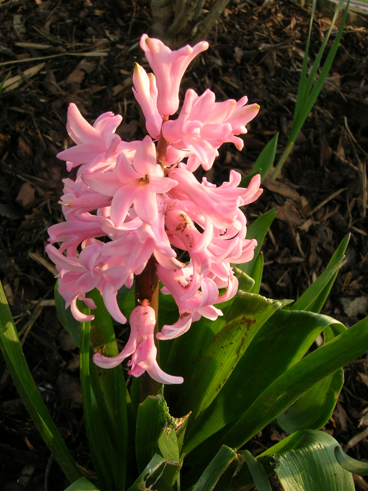 Hyazinthen